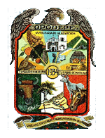 Escudo del municipio sonorense.